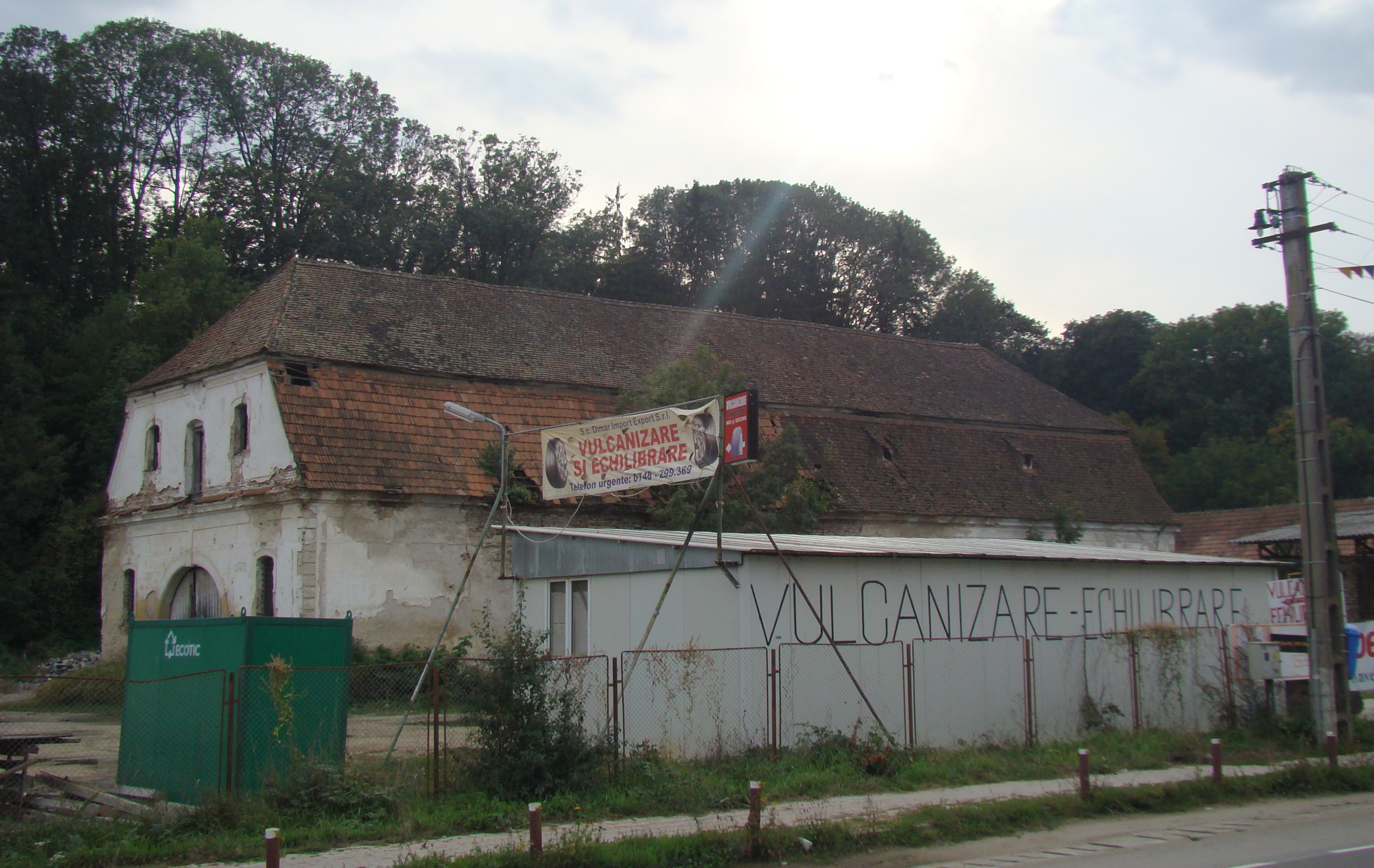 Fostă clădire anexă (șură) a Castelului Wass -Banffy, Str. Principală, sat Gilău 04